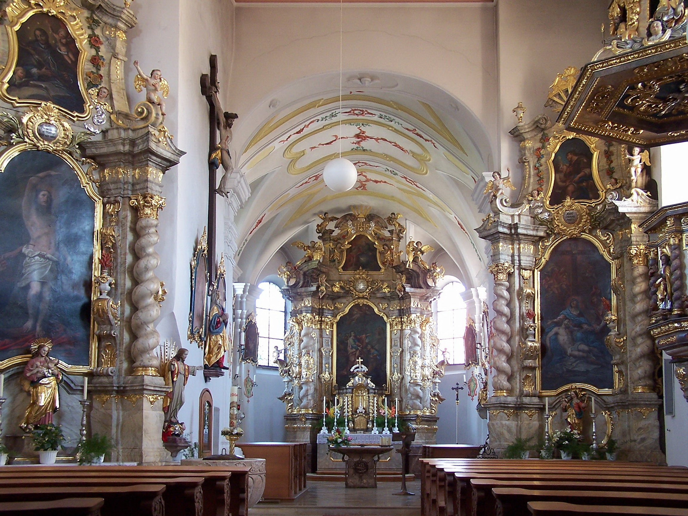 Sandsbach, Am Kirchberg 3; Am Kirchberg 2. Katholische Pfarrkirche St. Petrus. Das Langhaus ist ungleichmäßig gestaltet, da es an der Nordwand durch die hineinragenden Mauern des Turm verengt wird. Flachdecke mit Täfelung. Chorbogen und Fenster rundbogig verändert.